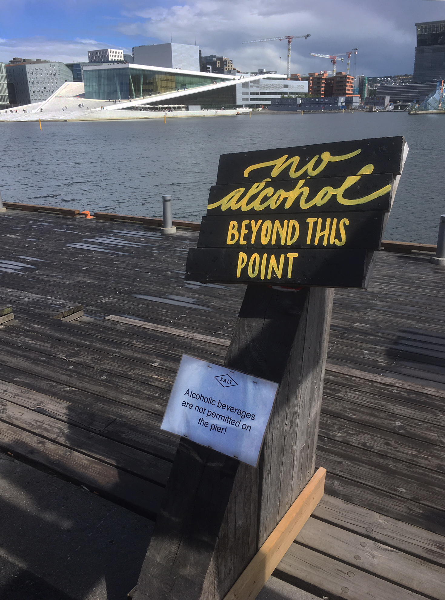 Uteserveringen på stedet Salt i Oslo havn håndhever skjenkebestemmelsene, hit, men ikke lenger